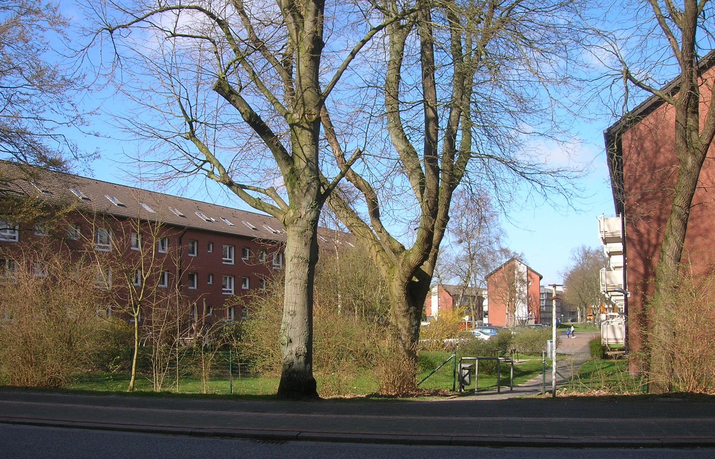 Ehemalige Wohnblocks für US-amerikanische Soldaten an der Straße Im Engenmoor in Bremerhaven-Lehe